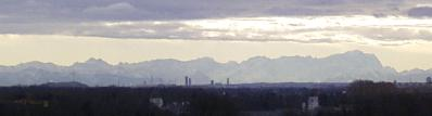 Föhnsicht am 24. 12. 2004 vom Domberg in Freising, rechts die Zugspitze